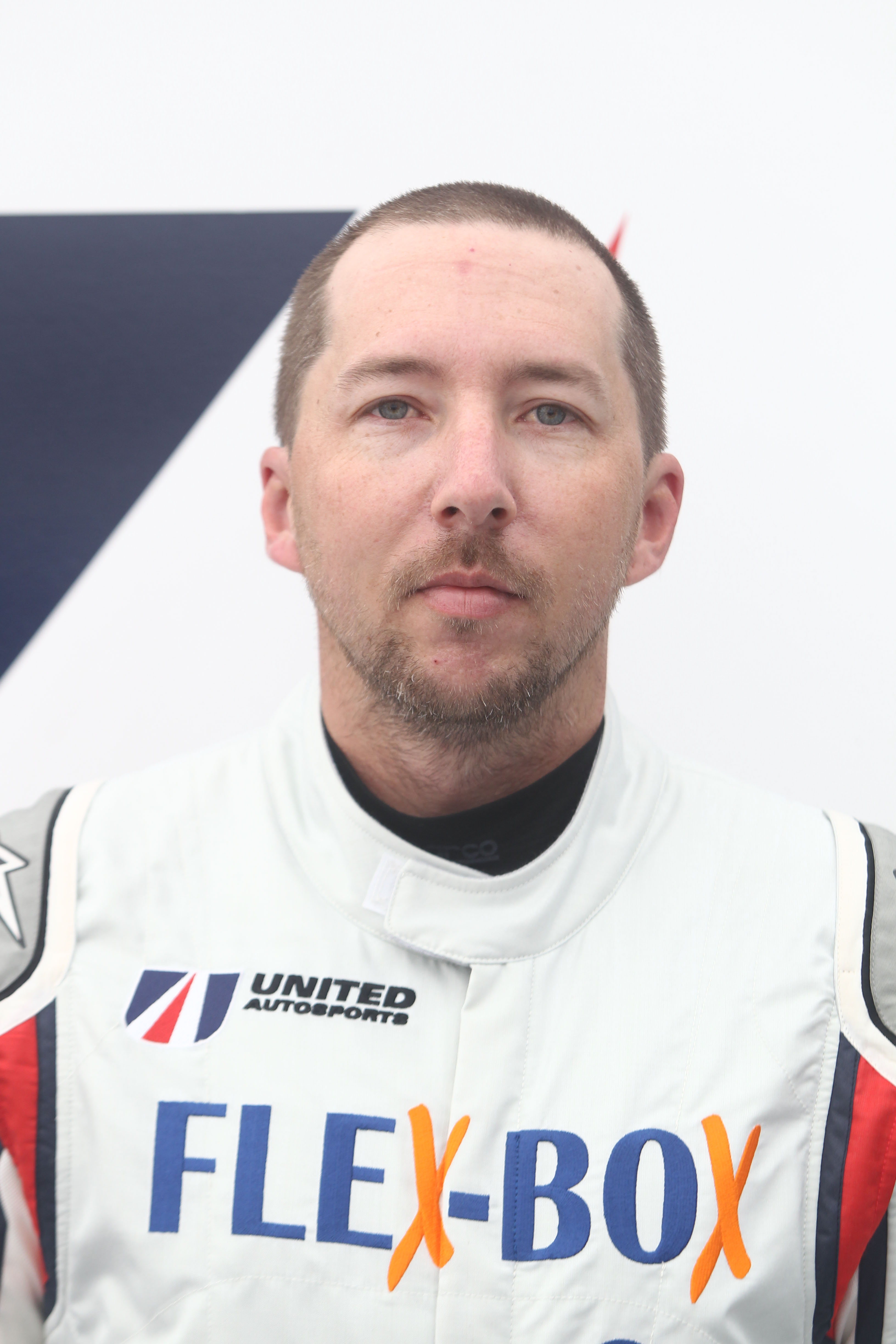 Hedlund-3